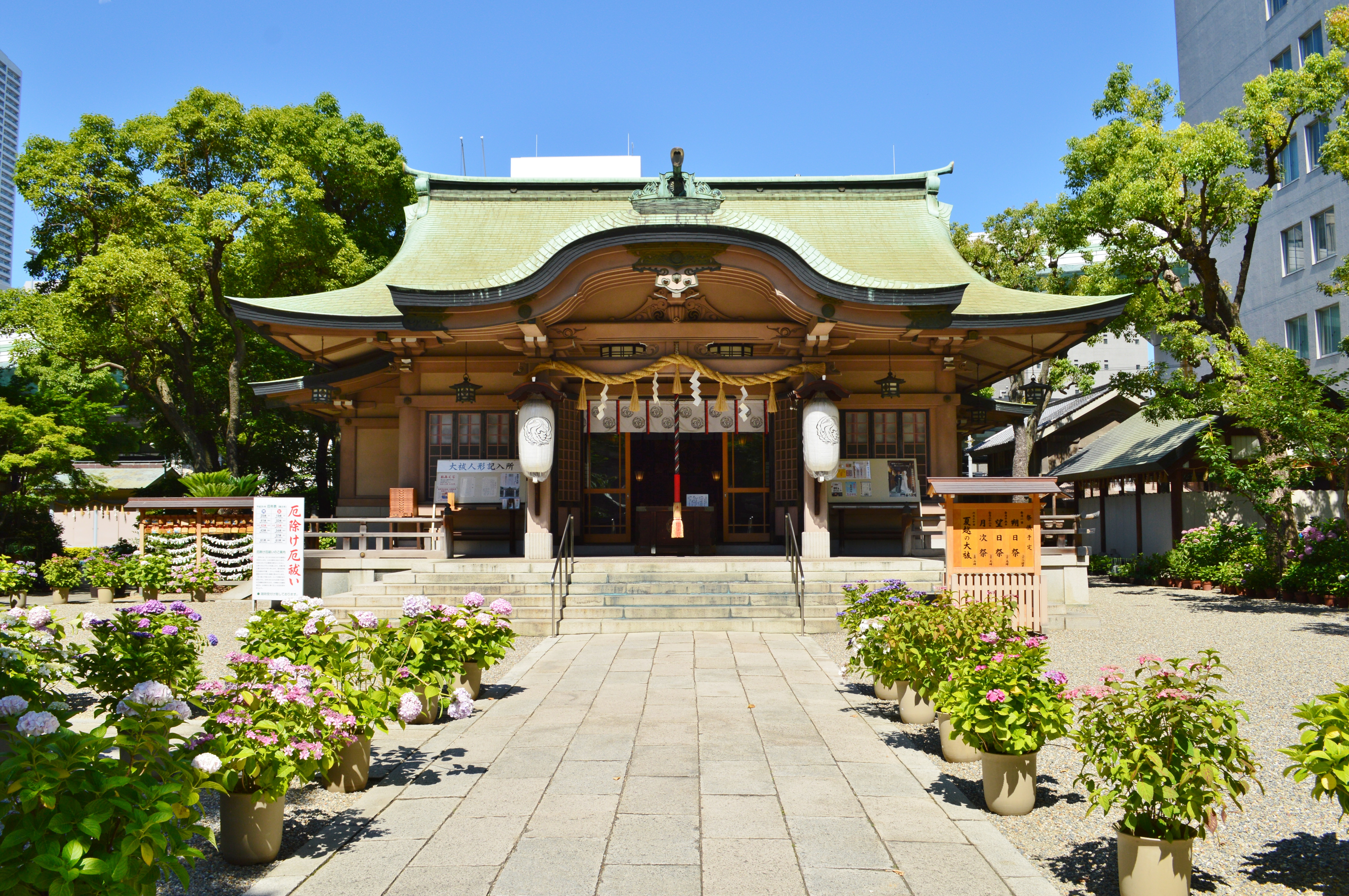 坐摩神社 拝殿